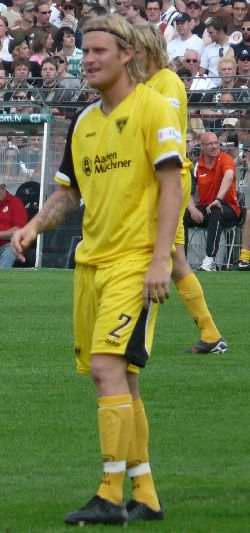 Nico Herzig (A.Aachen)